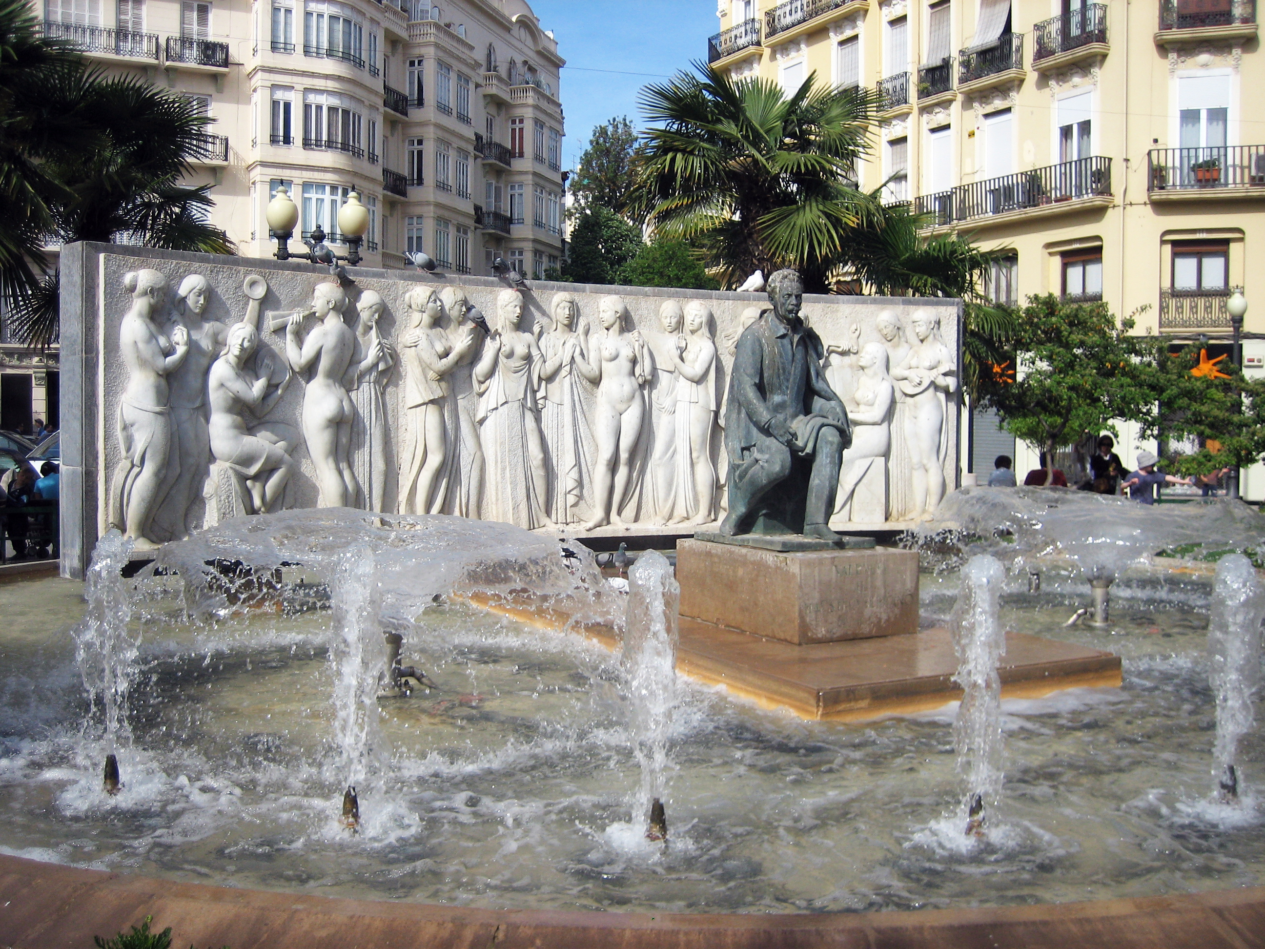 Avda. Reino de Valencia, Valencia. ¿Quién fue el Maestro Serrano? José Serrano Simeón (* Sueca, Valencia (España); 14 de octubre de 1873 ? ? Madrid (Id.); 8 de marzo de 1941), fue un compositor español, conocido por sus más de cincuenta zarzuelas. Las obras de Serrano tienden hacia un teatro popular simple pero cargado de emoción dramática. La influencia de Giacomo Puccini y el verismo italiano es evidente en muchas de sus obras. También compuso el himno de le primera exposicion regional Valenciana de 1909 que ha sido adoptado oficialmente como Himno de la Comunidad Valenciana.